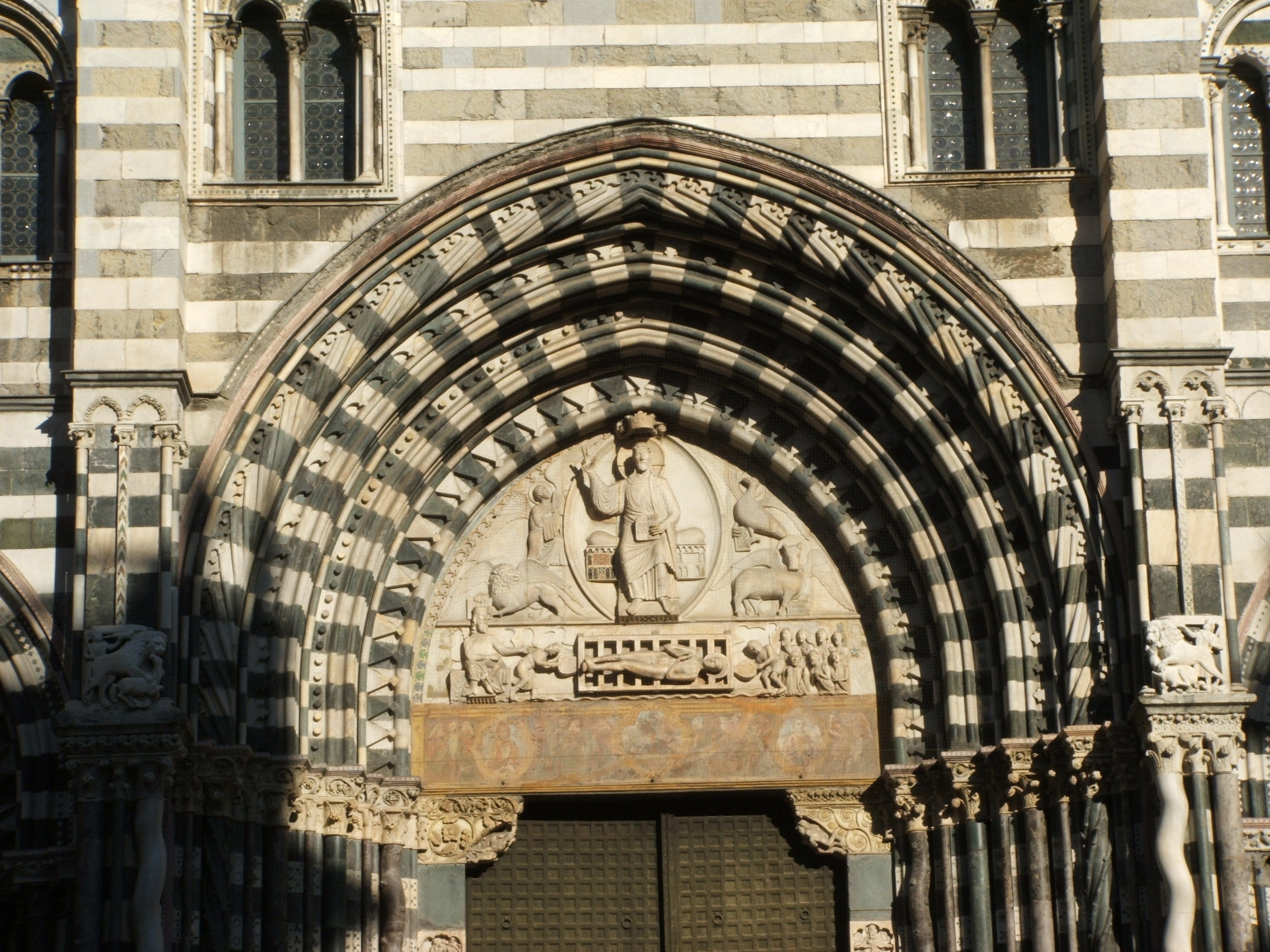 Lunetta del portale (sec. XIII) della Cattedrale di San Lorenzo a Genova.